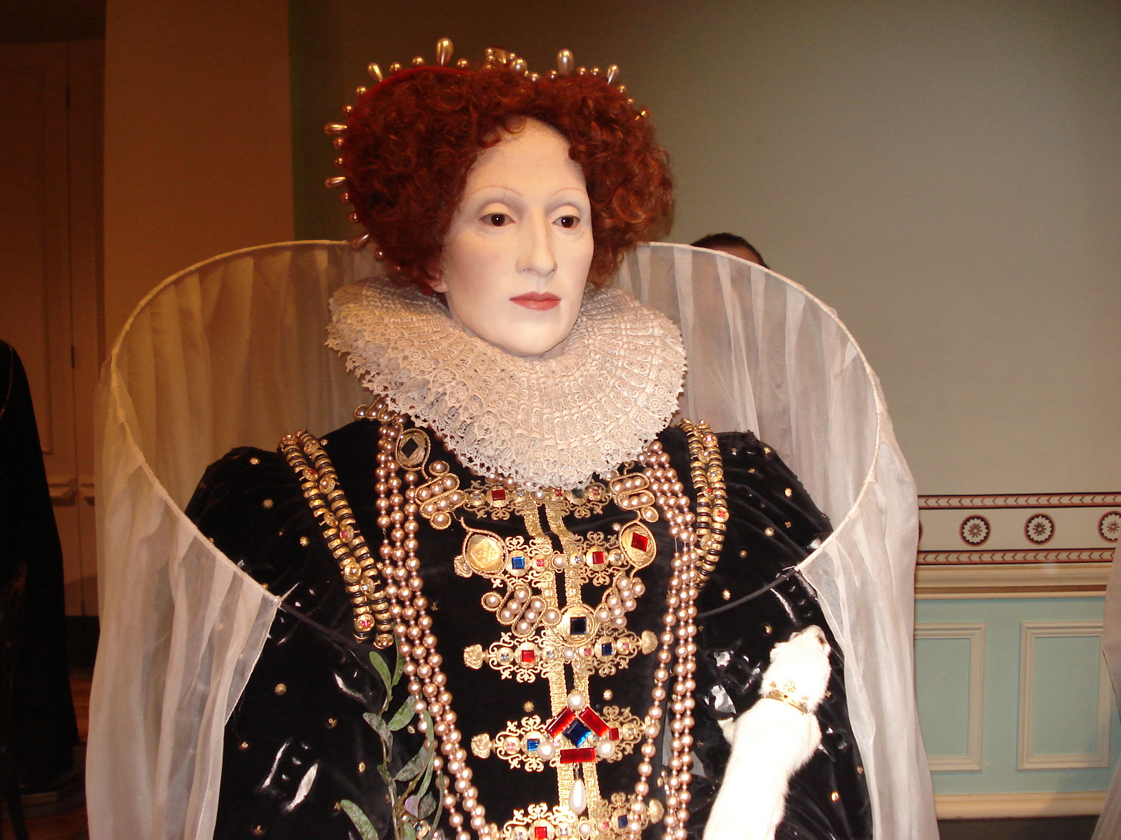 Mme Tussaud museum